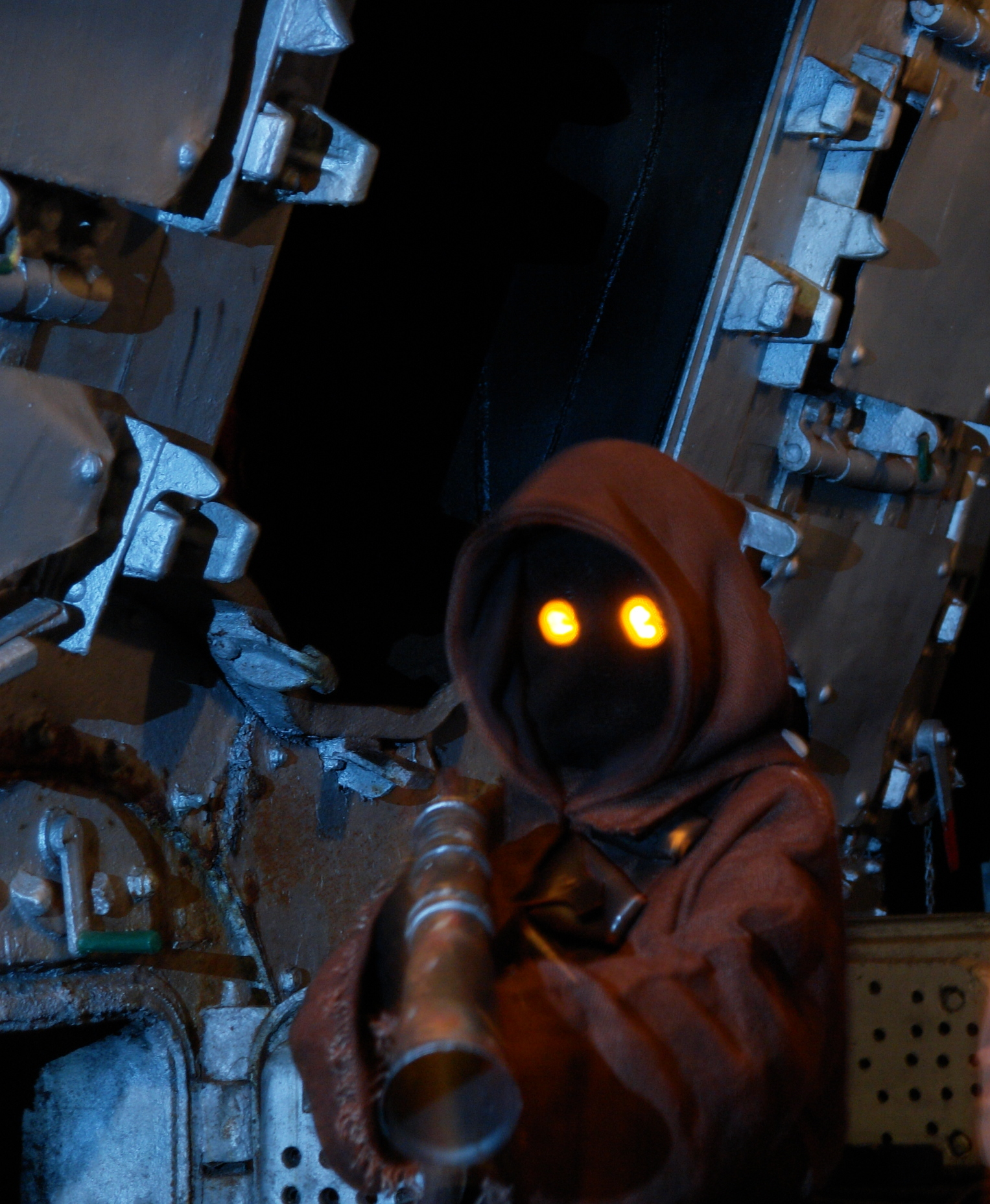 Gdańsk, noc muzeów.